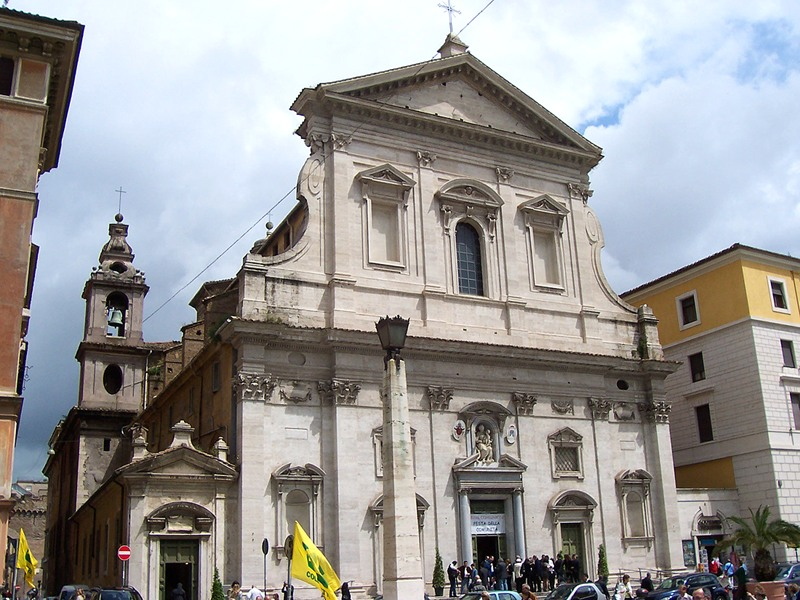 Roma - Chiesa di S. Maria in Traspontina